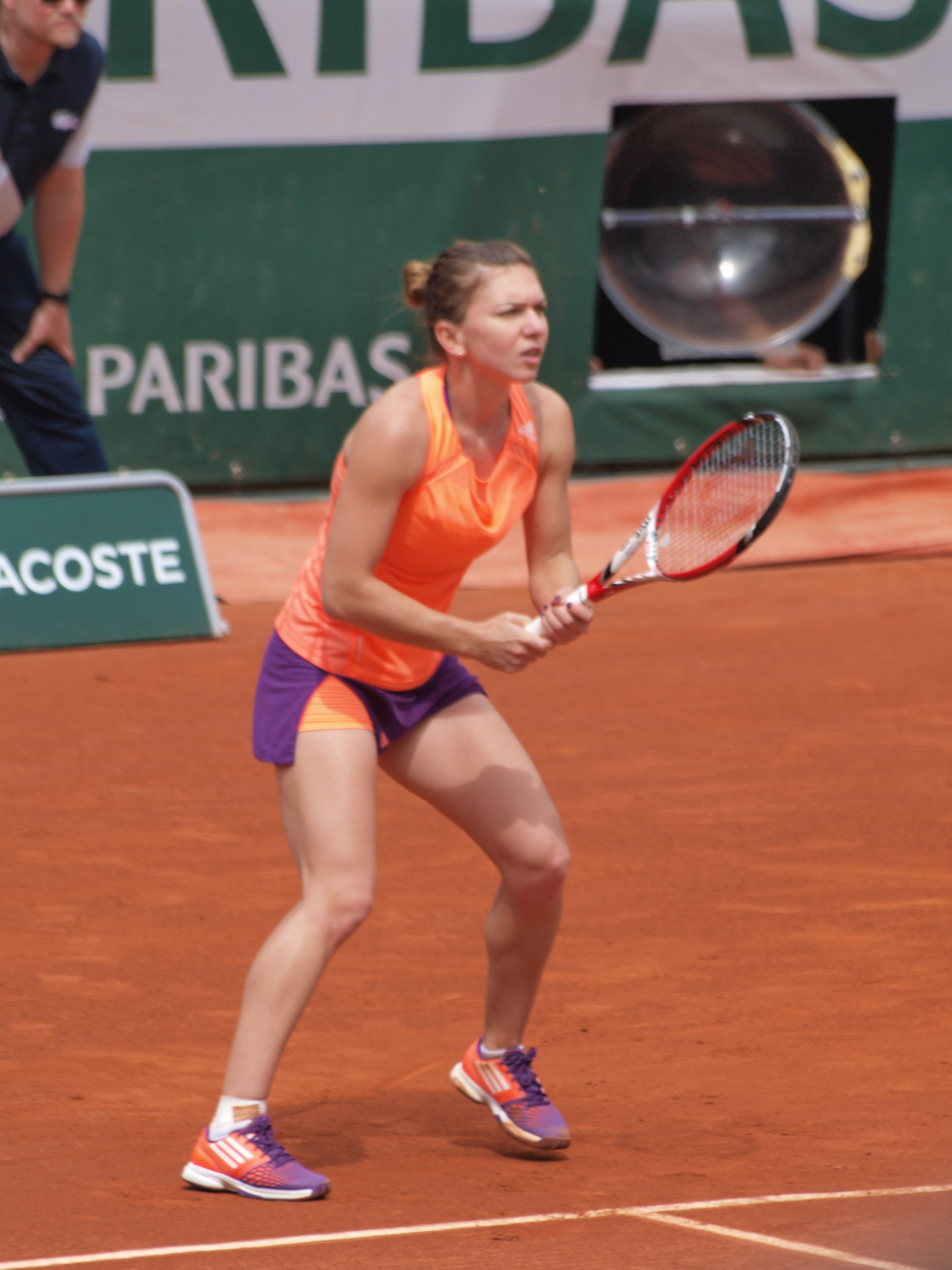 Internationaux de France de tennis, le 2 juin 2014, sur le court Philippe Chatrier : Simona Halep